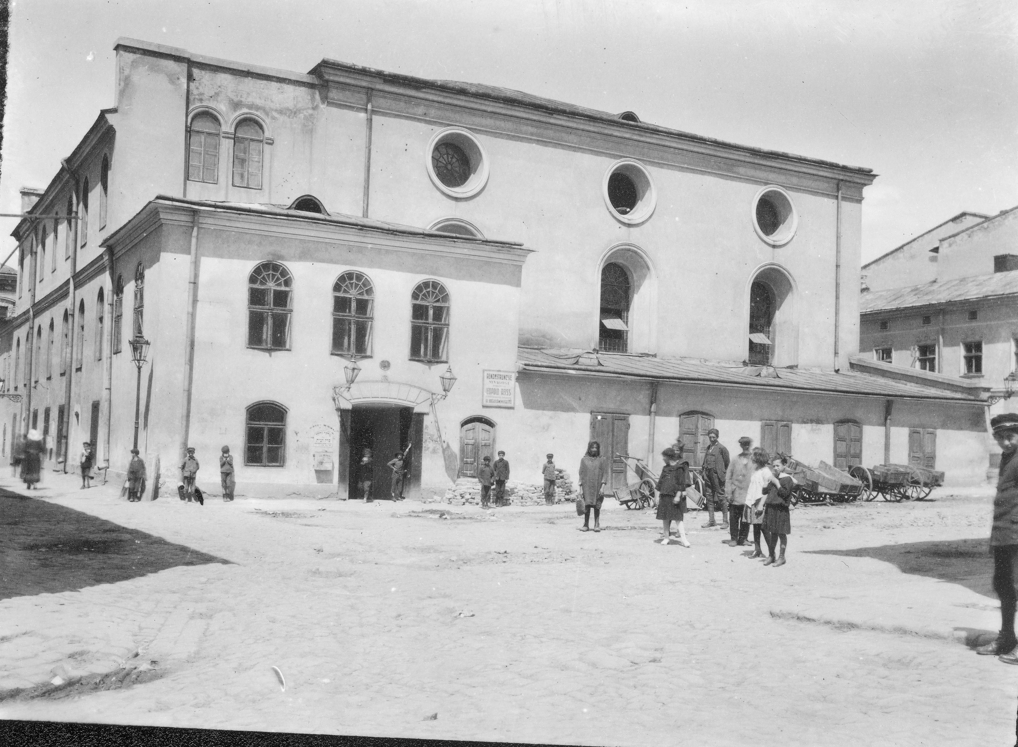 Большая Предместная синагога во Львове